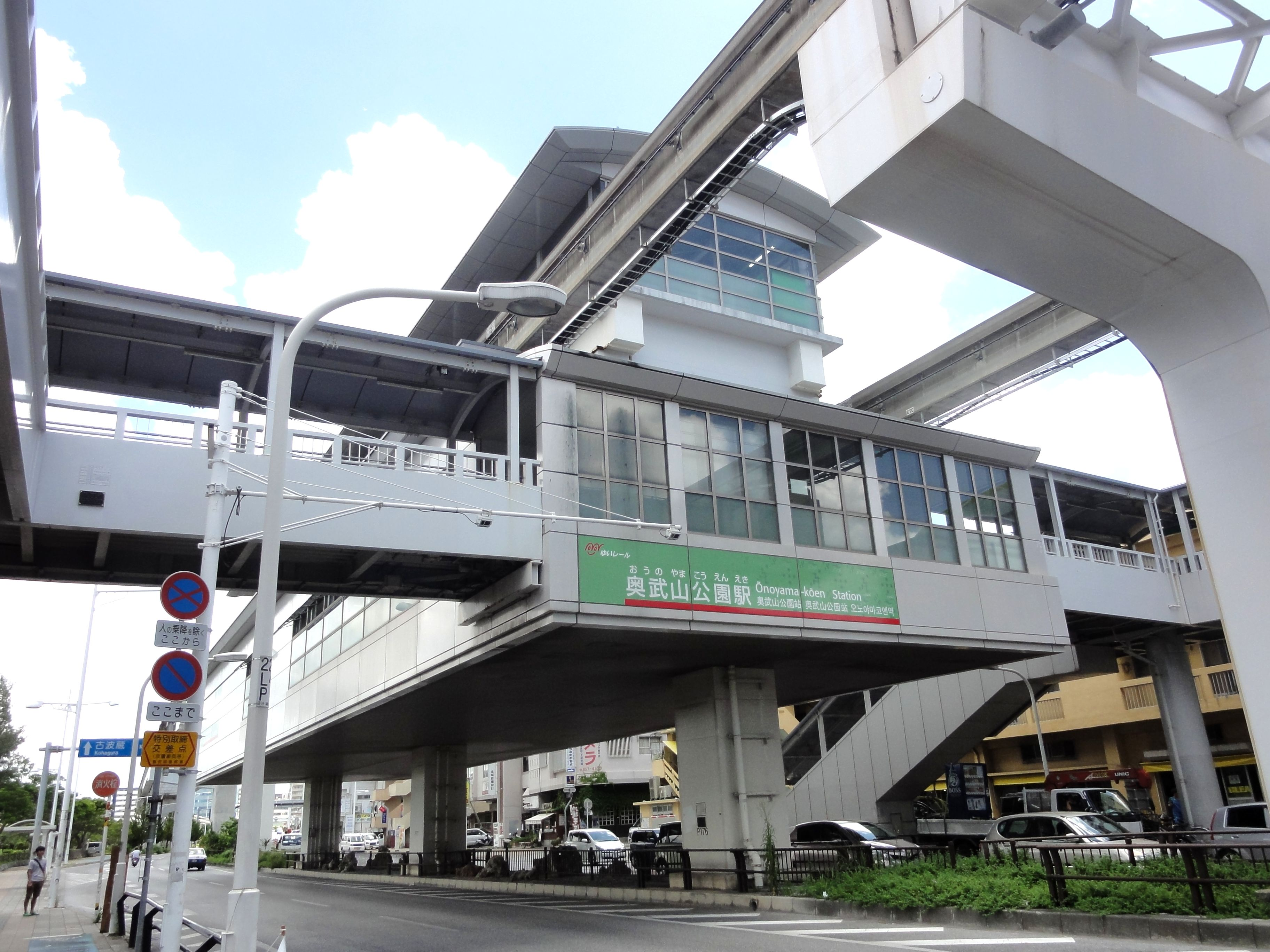 沖縄都市モノレール奥武山公園駅